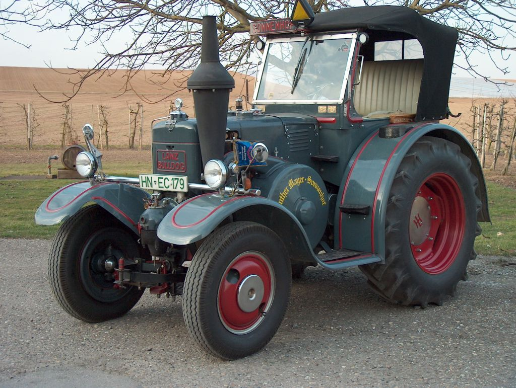 Lanz Bulldog D 9506